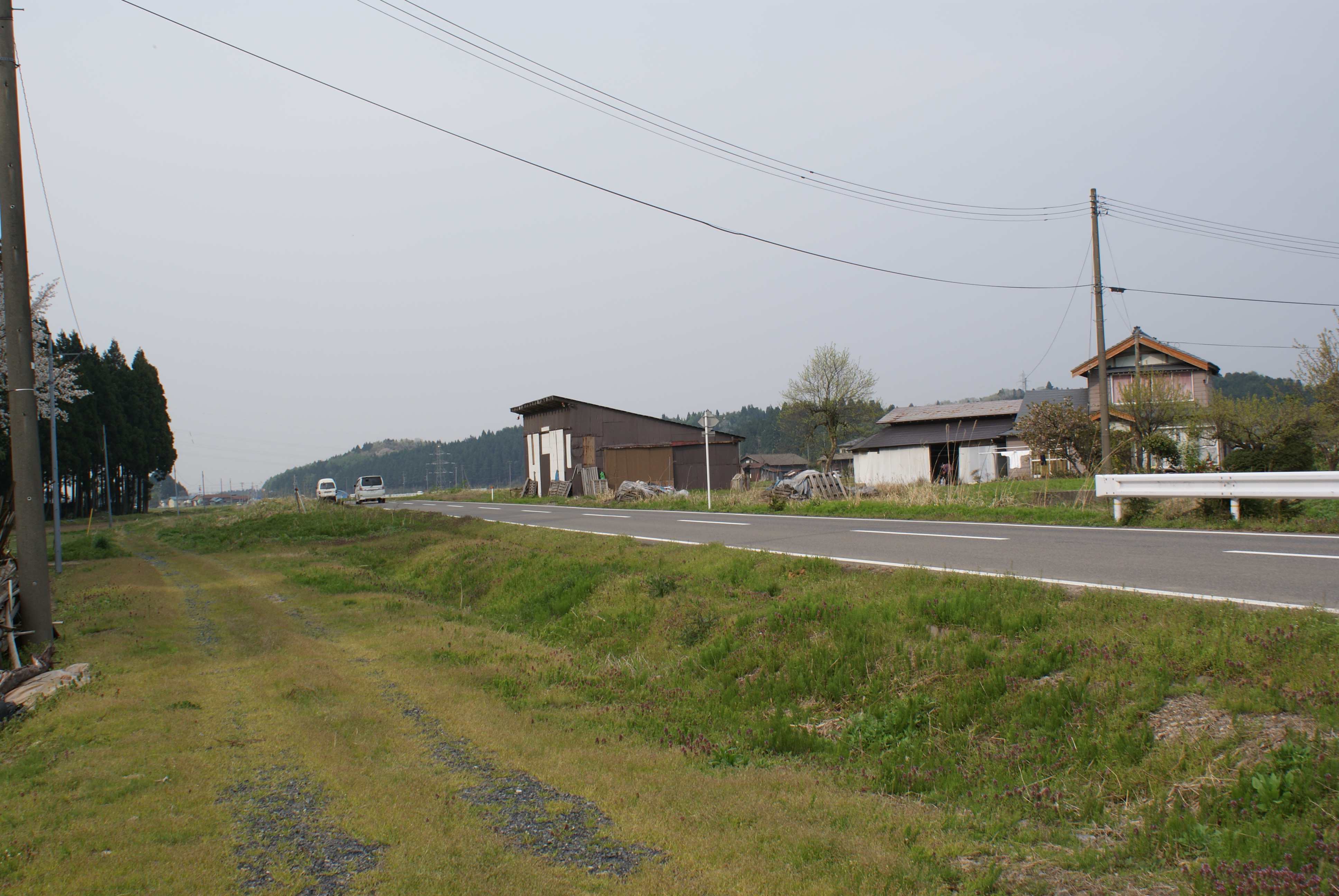 旧蒲原鉄道大蒲原駅跡。